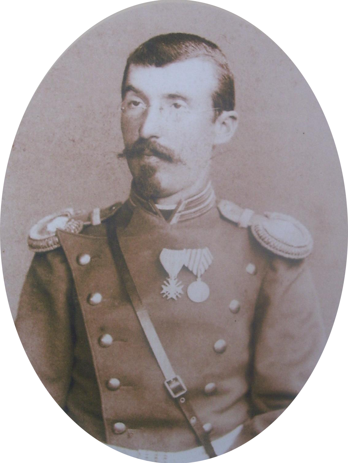 Тома Давидов.